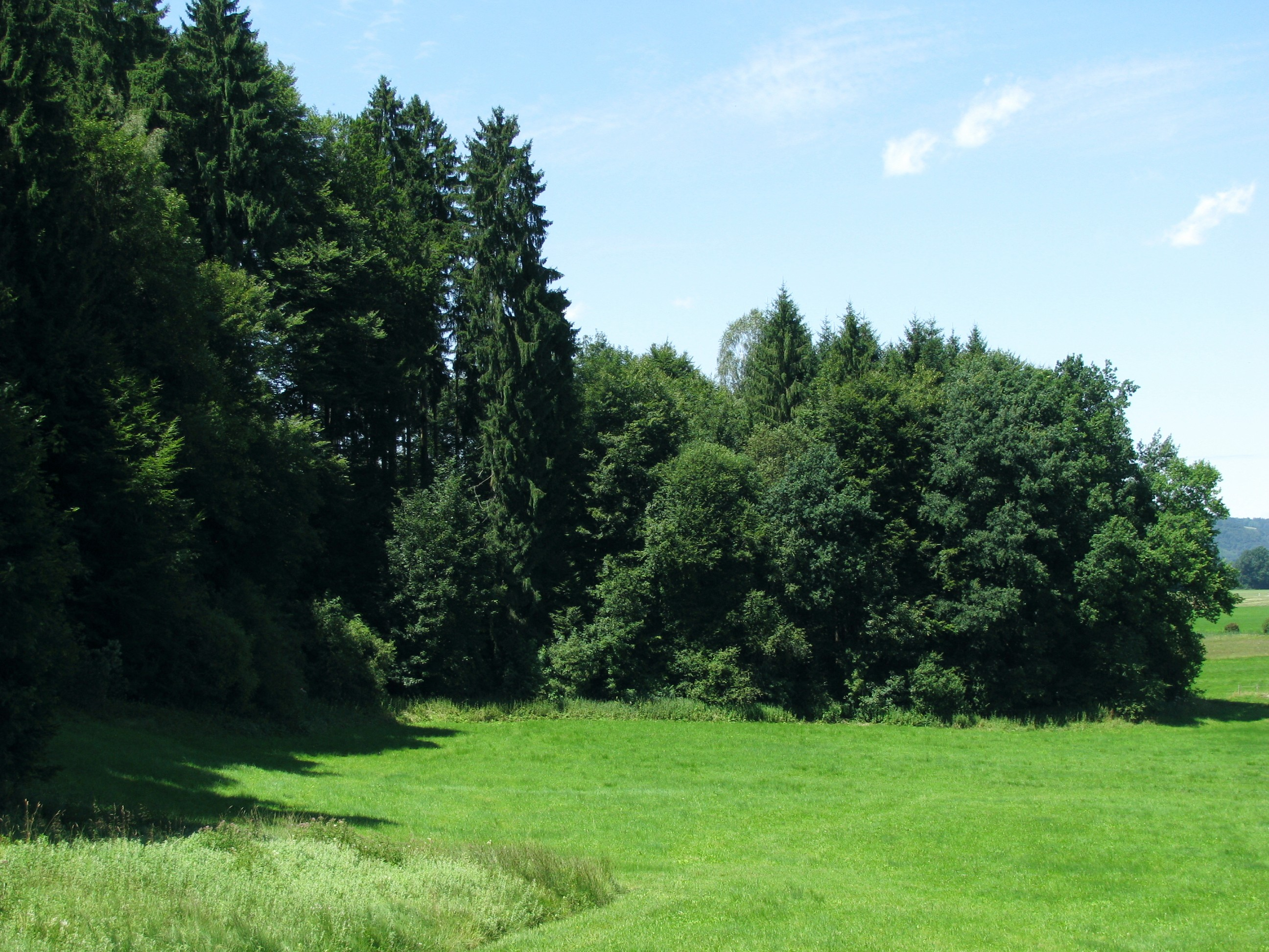 Burgstall Willenberg; Ansicht des Burghügels von Osten